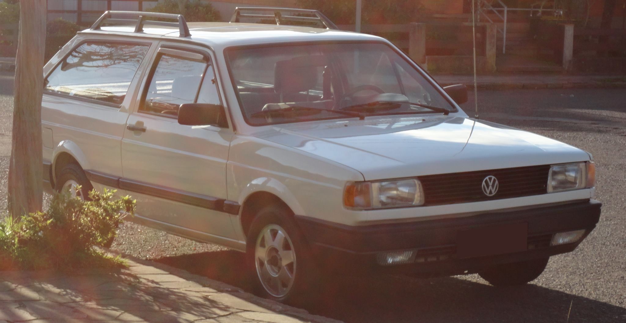 Volkswagen Parati GL 1.8 1994 95 cv